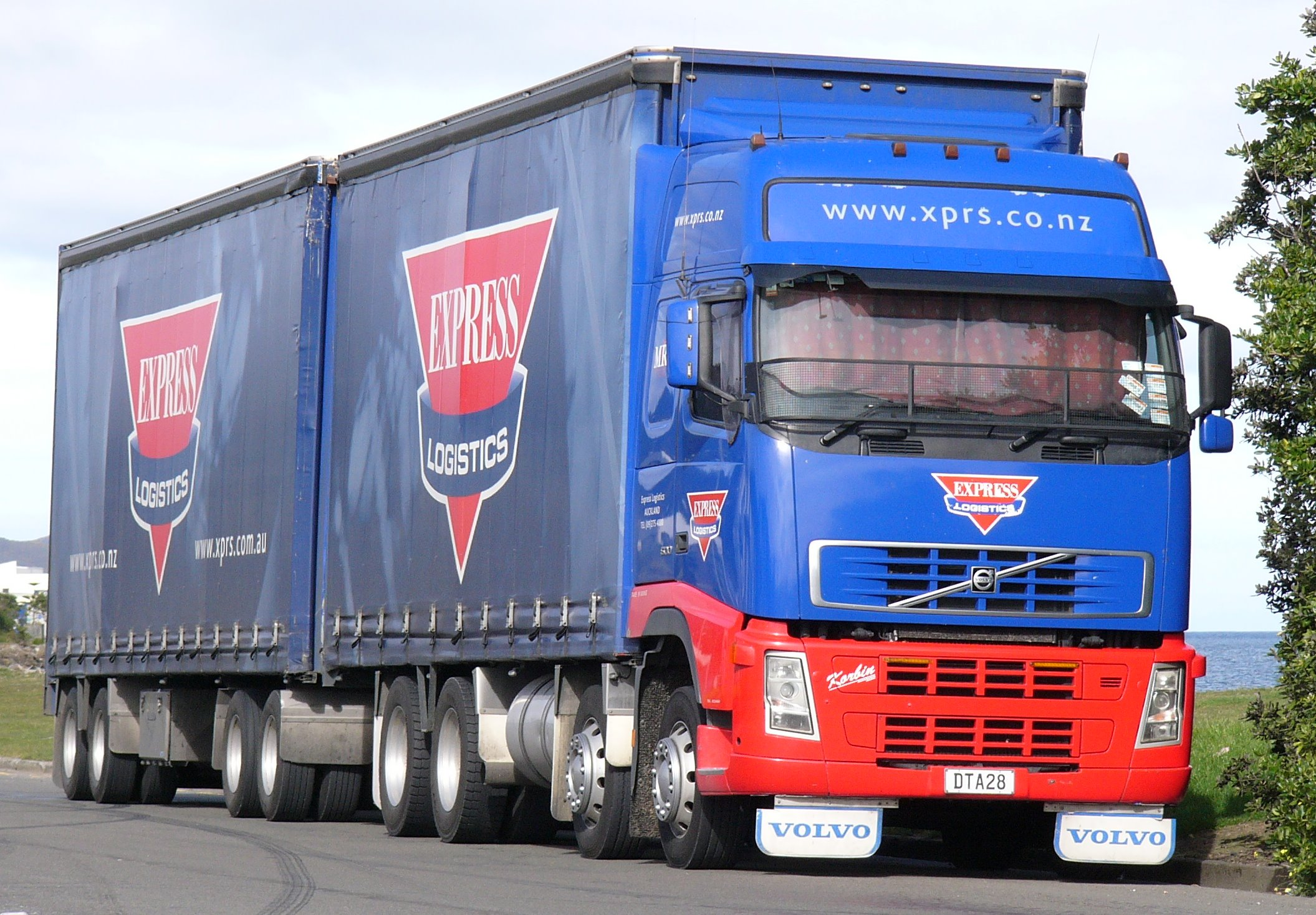 2005 Volvo FH12